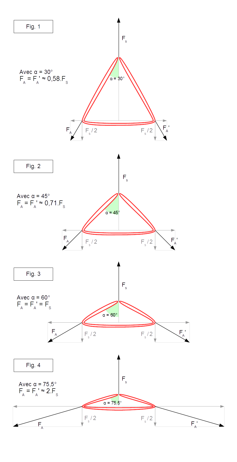 Répartition des forces dans une élingue pour un ancrage de slackline, en fonction de l'angle formé par les brins d'accroche